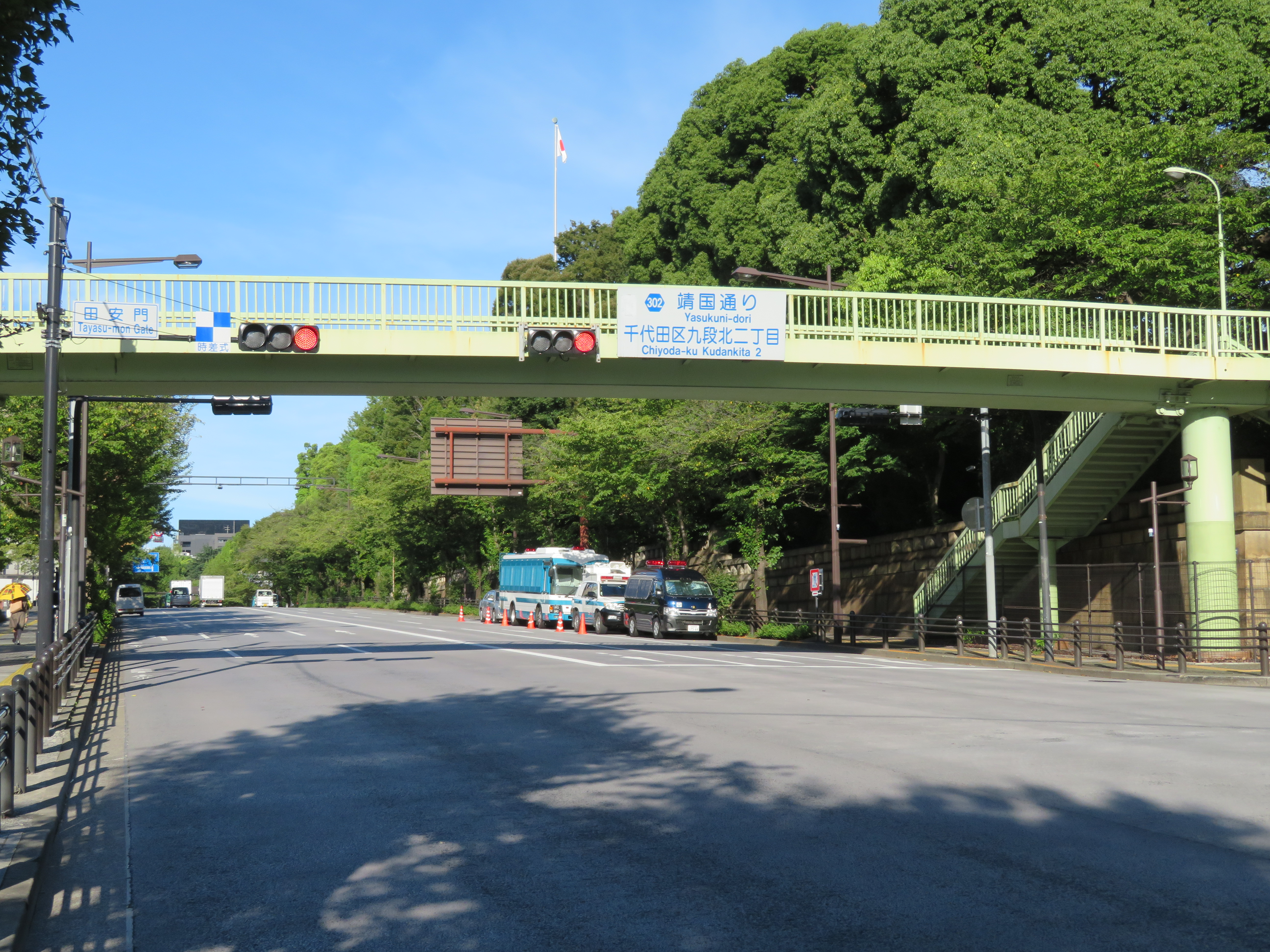 都道302号線（靖国通り）千代田区九段北二丁目付近（市ヶ谷駅方面を撮影） Canon PowerShot SX720 HS